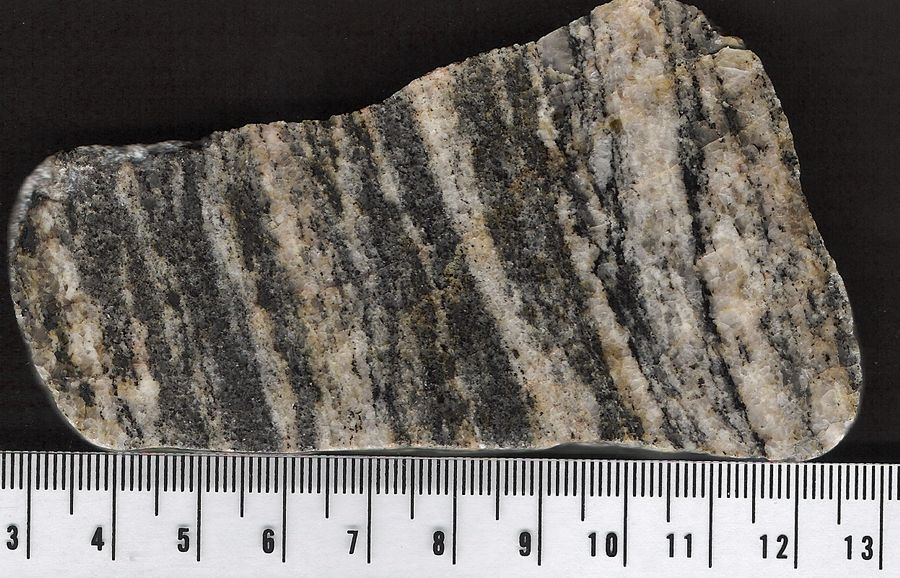 Bändergneis (Strandgeröll vom Ufer des Baikalsees).